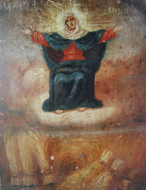 Икона Божьей Матери "Спорительница хлебов". Написана в Шамордино, с дарственной надписью на обороте: «Благословение Батюшки О.Анатолия. 1912». Хранится в Третьяковской галерее, была опубликована в 2001 году.